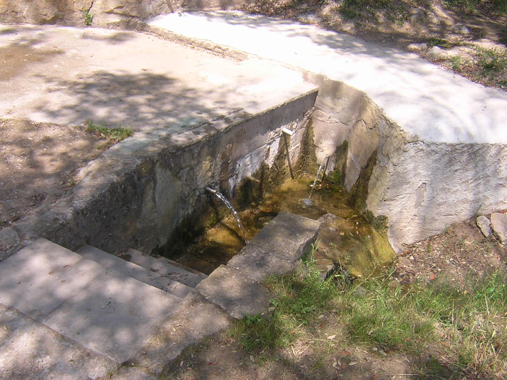 La Font de Ca l'Estiraguers (Monistrol de Calders, Moianès)